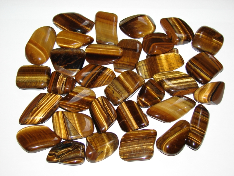 bębnówka tygrysiego oka, RPA